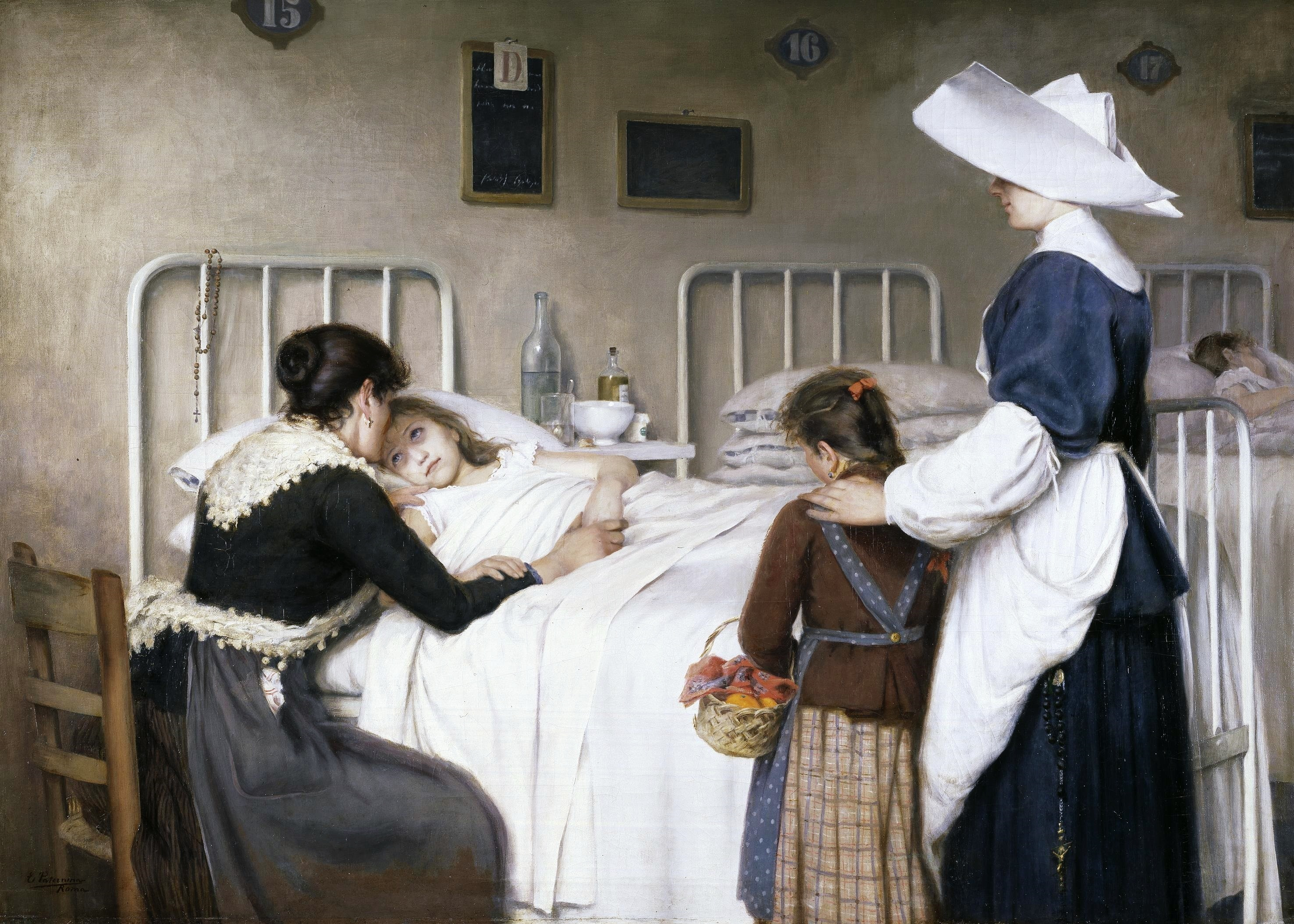 La obra representa a una madre visitando a su hija, que se halla enferma y en la sala de un hospital.